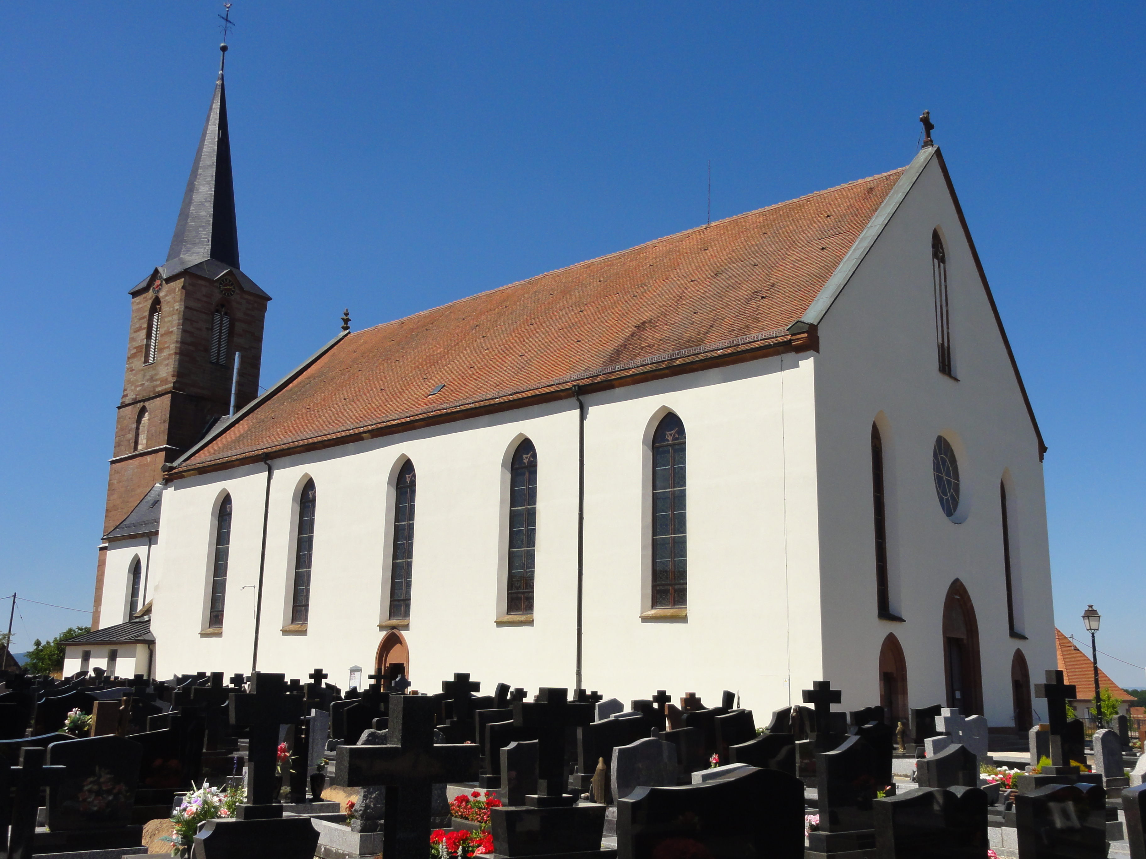 Alsace, Bas-Rhin, Schleithal, Église Saint-Barthélemy (IA67008679).